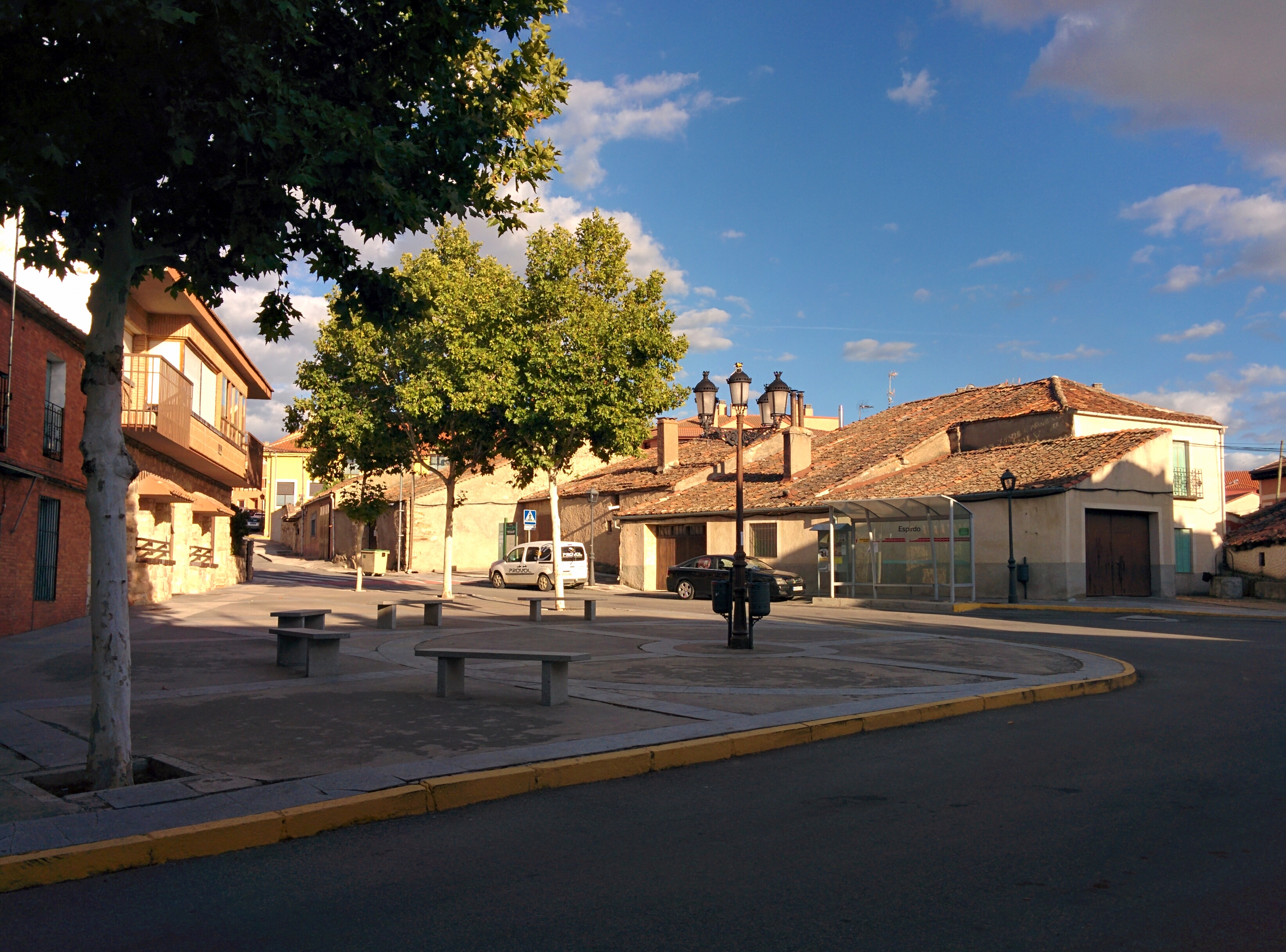 Plaza de la Constitución, en Espirdo (Segovia, España).